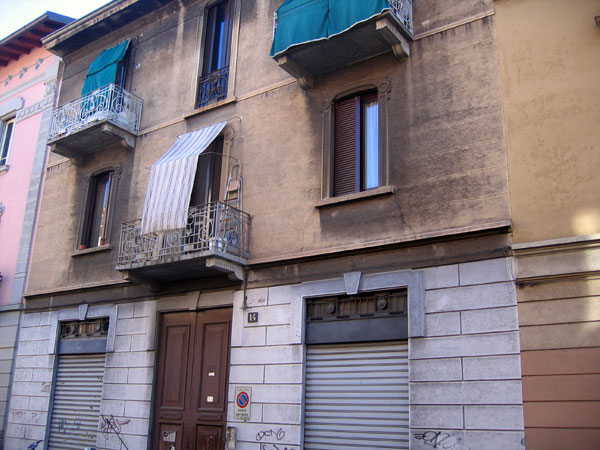 Via Gluck, 14, la casa dove abitava Adriano Celentano da giovane.